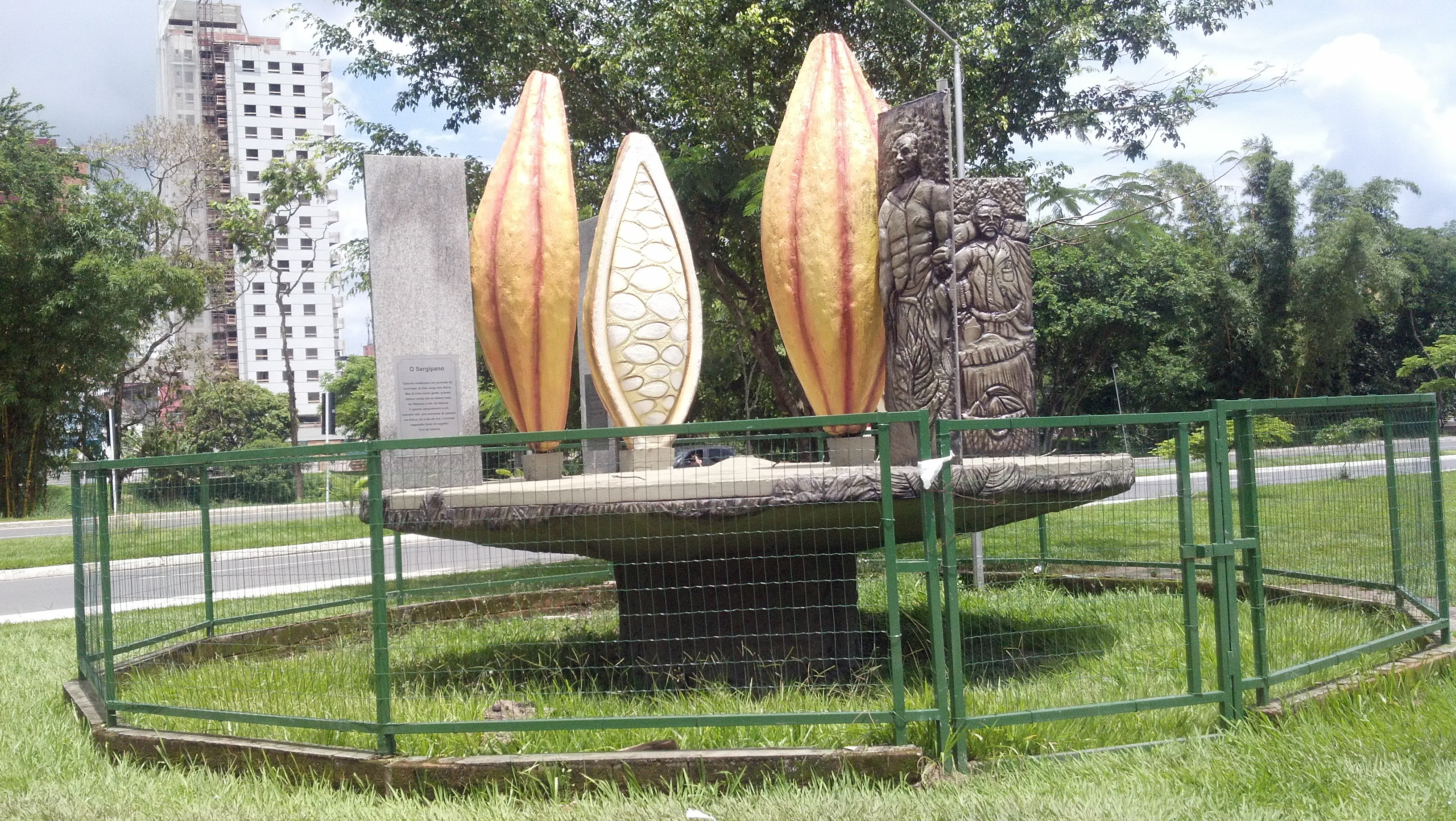 Esculturas Cacaus na Praça do Cacau em Itabuna - Ba